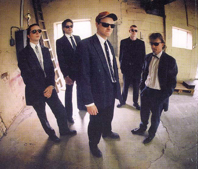 Funny Farm 1996. Fv. Lars Haugdal Andersen (gitar), Ståle Norum (trommer), Ragnar Fahsing (bass), Morten Skjørholm (gitar) og Jan Roger Roel (vokal). Foto: Aage Asphaug